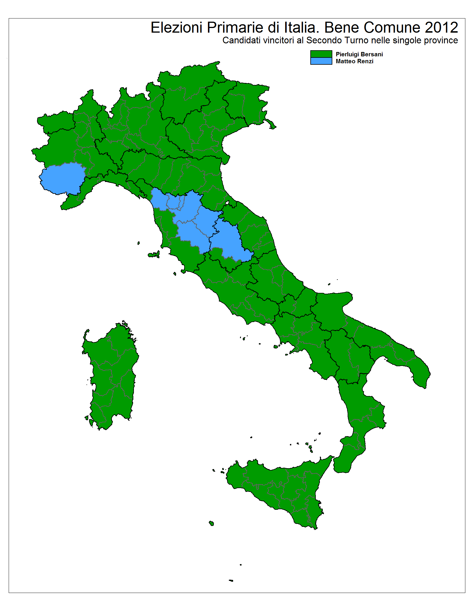 Candidati vincitori nelle singole province nelle Elezioni Primarie di Itali. Bene Comune del 2012.